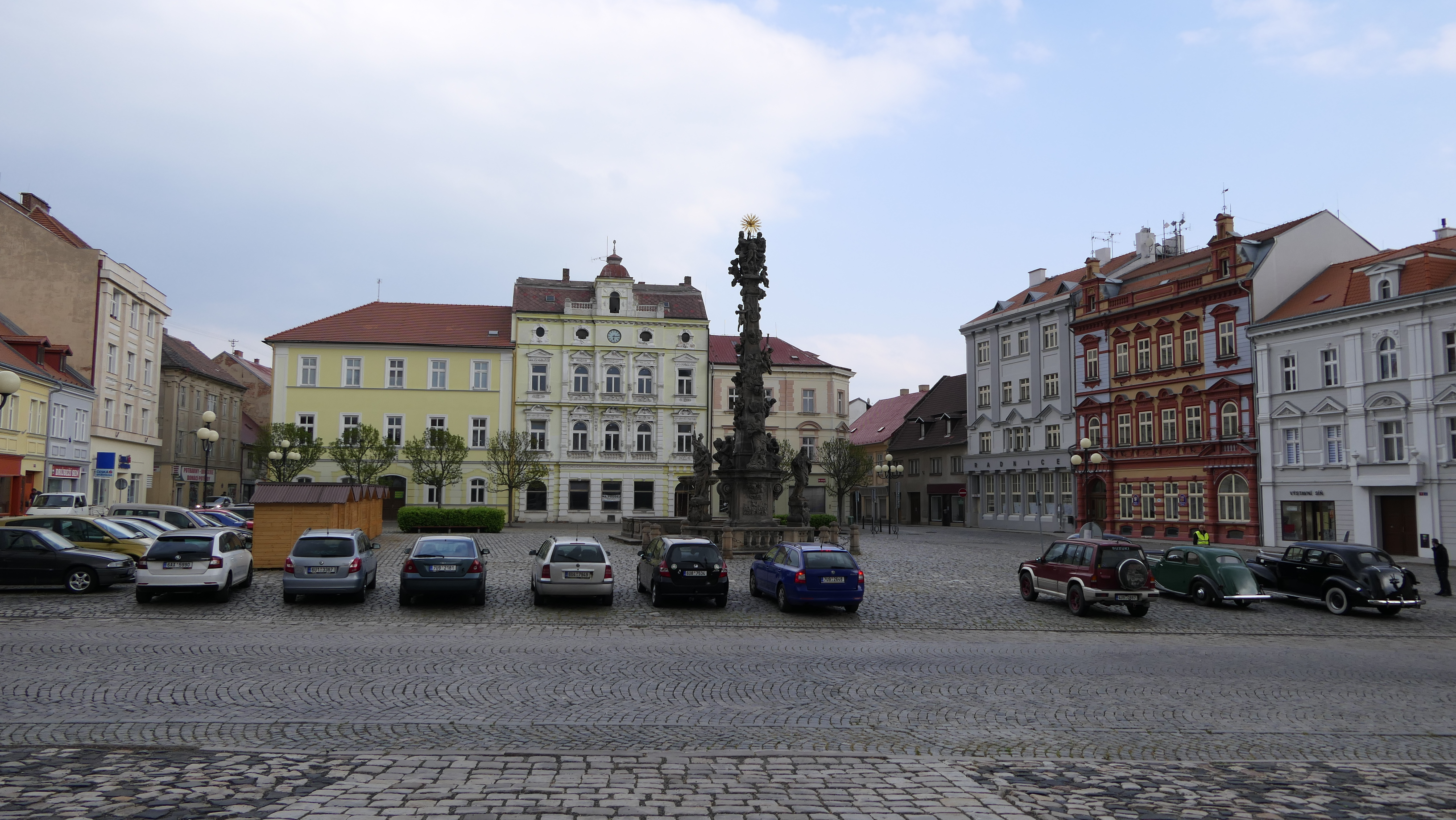 Marktplatz von Duchcov - Platz der Republik